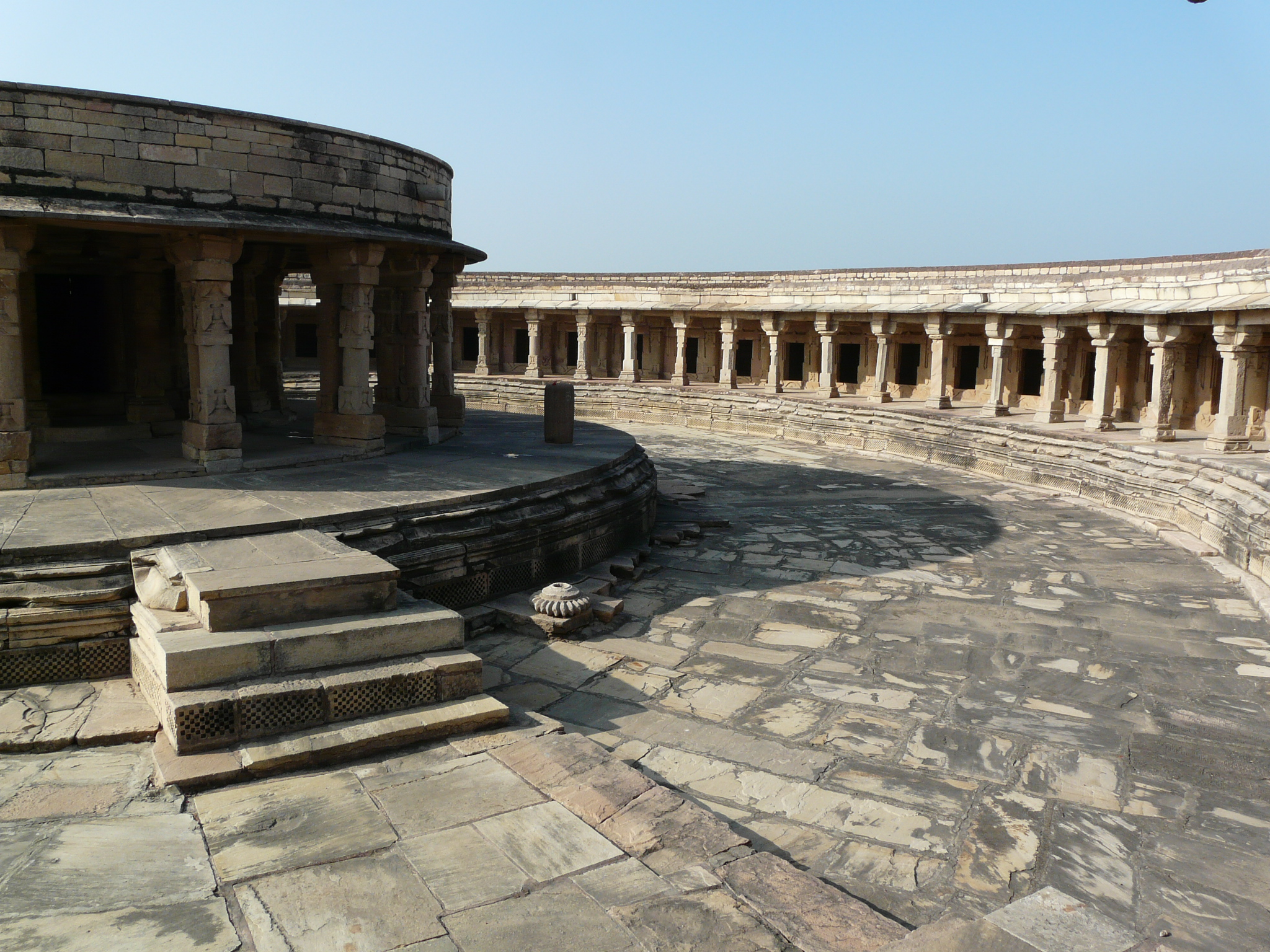 Chausath Yogini Temple Chausath Yogini Temple, Mitawali, Morena district, Madhya Pradesh, India